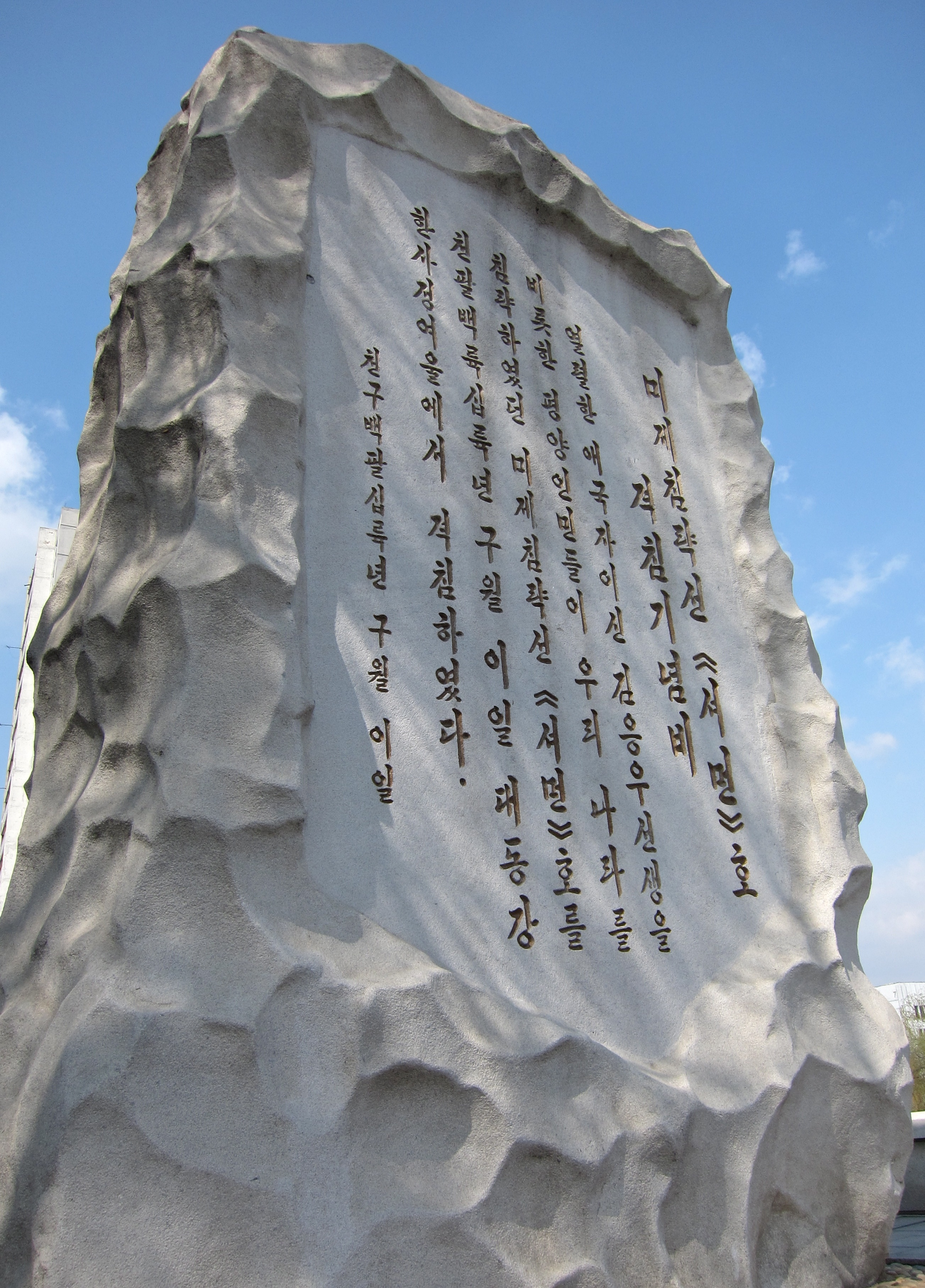 Pyongyang, DPRK (North Korea)